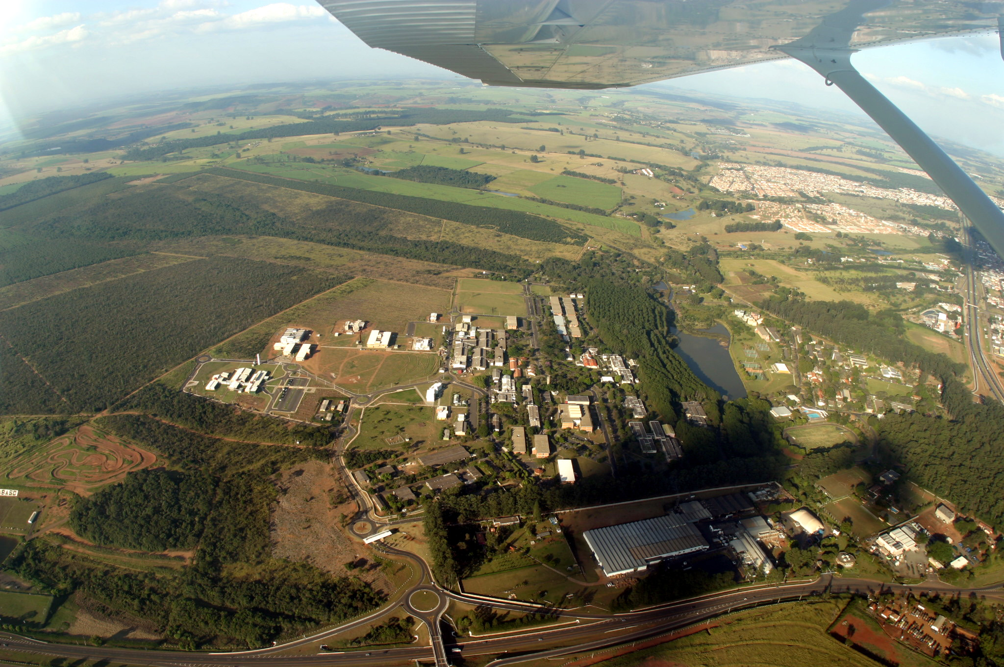 Foto aerea da Universidade Federal de São Carlos (USFCar)